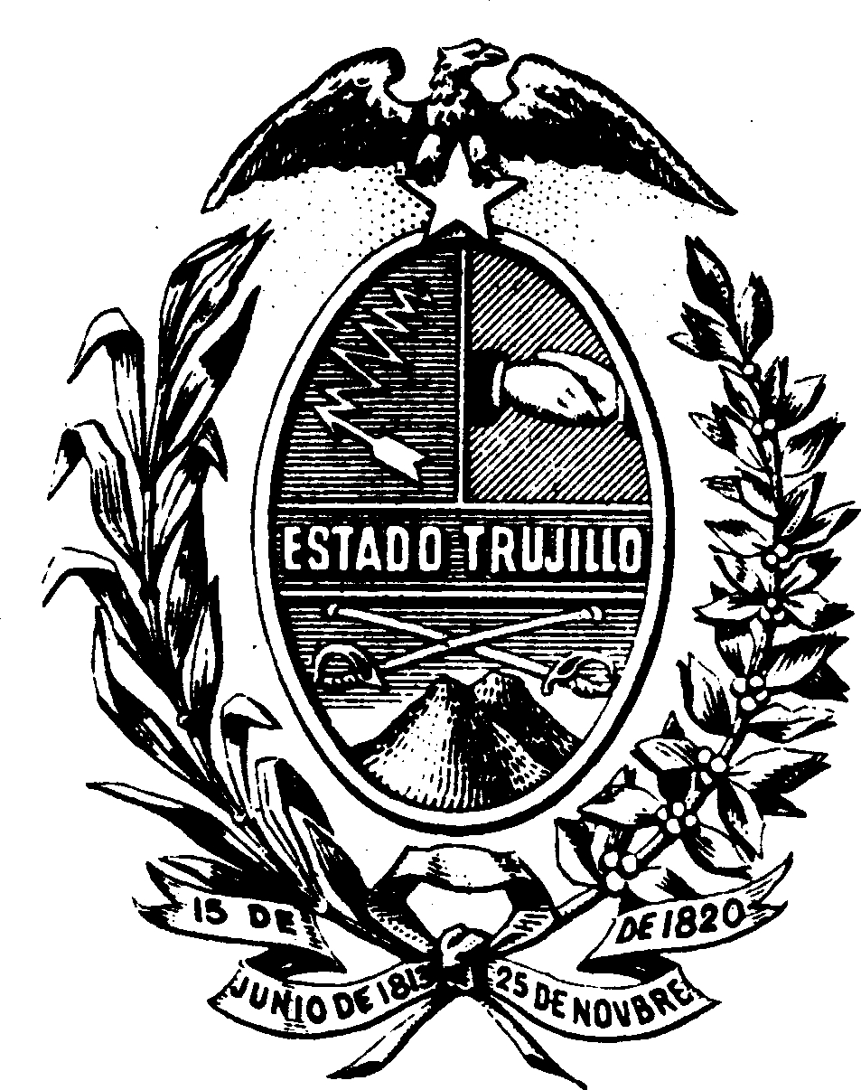 Escudo del estado Trujillo tomado del Libro "Ofrenda de Venezuela en el primer centenario de la Batalla de Ayacucho. Litografía del Comercio. 1924"